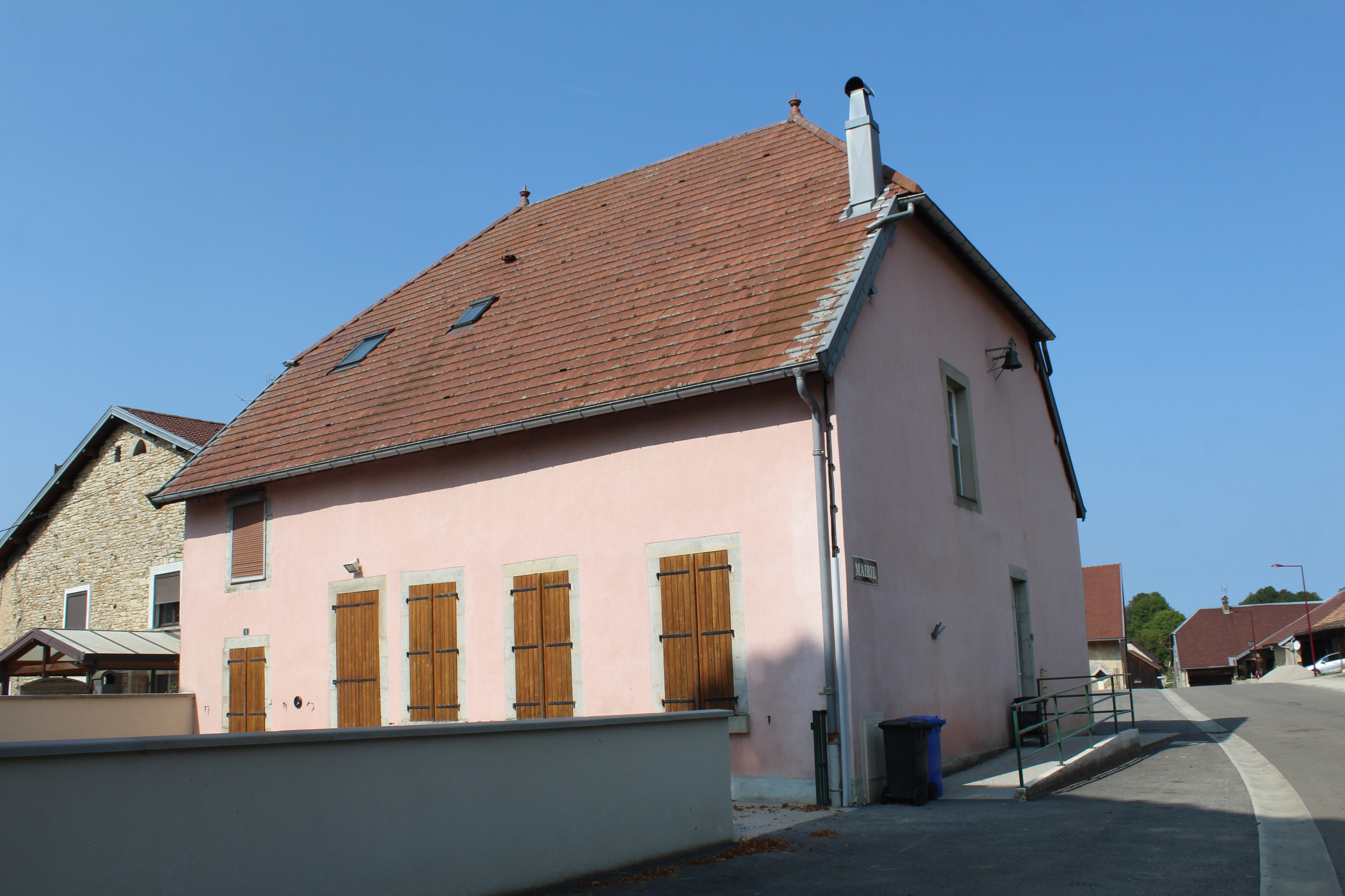 Mairie de Thésy.